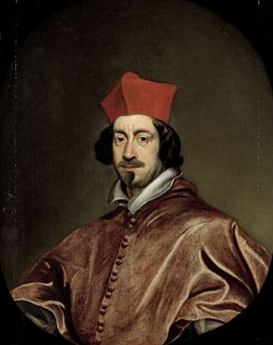 Bildnis des Kardinals Ernst Adalbert von Harrach (1598-1667)